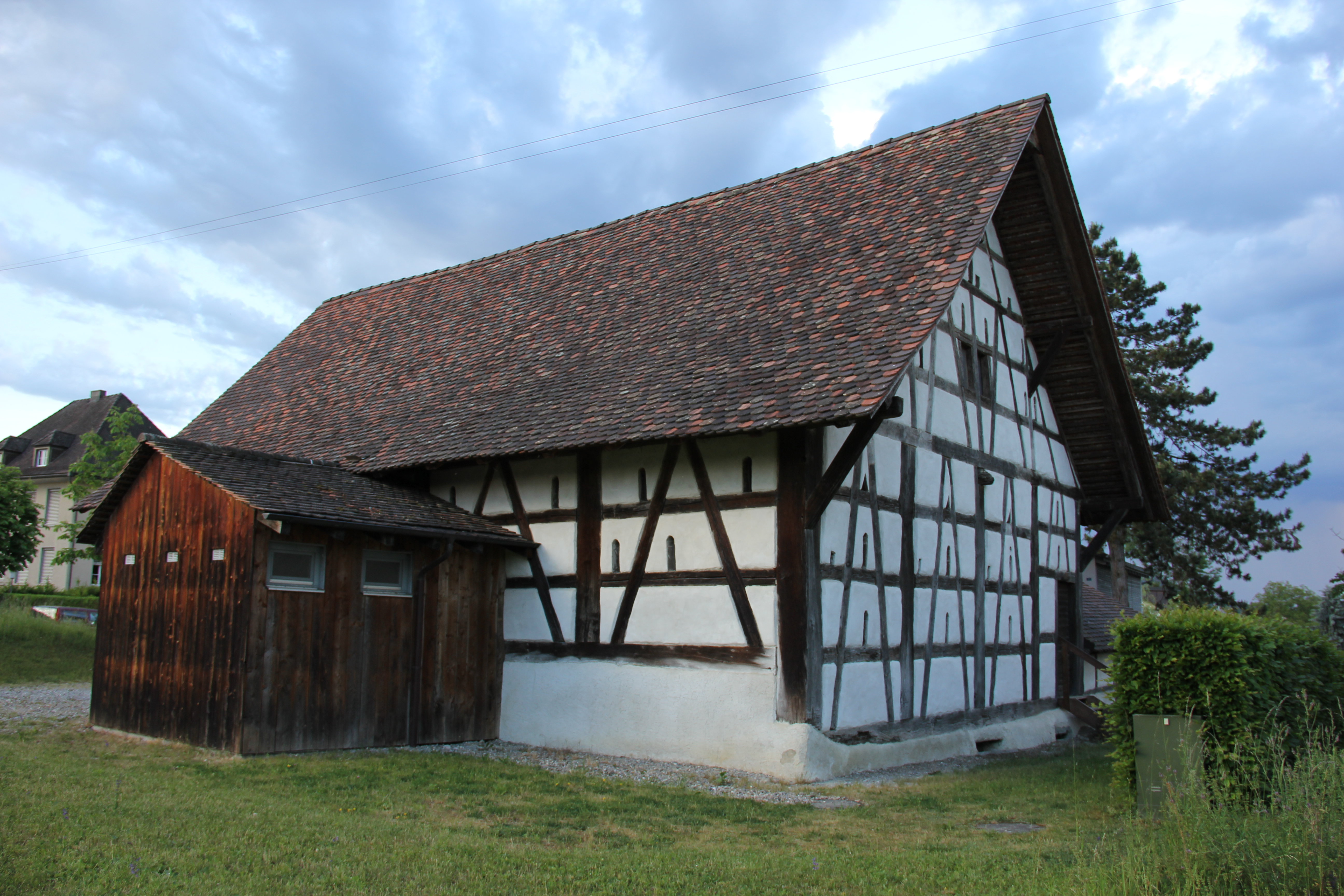 Ehemalige Propstei-Trotte in Wagenhausen Ansicht Nord-Ost